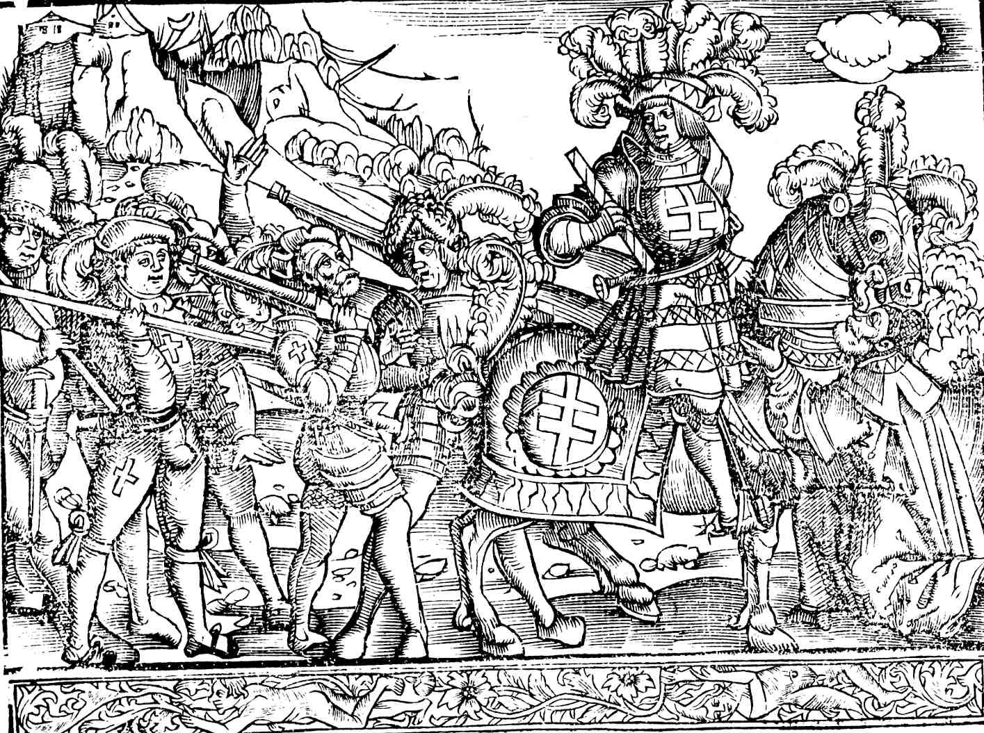 Title: Renatus a civibus intra Nanceium exceptus. Ea illi reddita a Burgundis. René prend la ville de Nancy. Les Bourguignons la restituent (7 octobre 1476). Technique: Engraving on wood Dimensions: Country of origin: France Current location (city): Nancy Current location (gallery): Bibliothèque Diocésaine Other notes: Image extraite du catalogue de l'exposition "America. L' Amérique est née à Saint-Dié-des-Vosges en 1507" (1992).